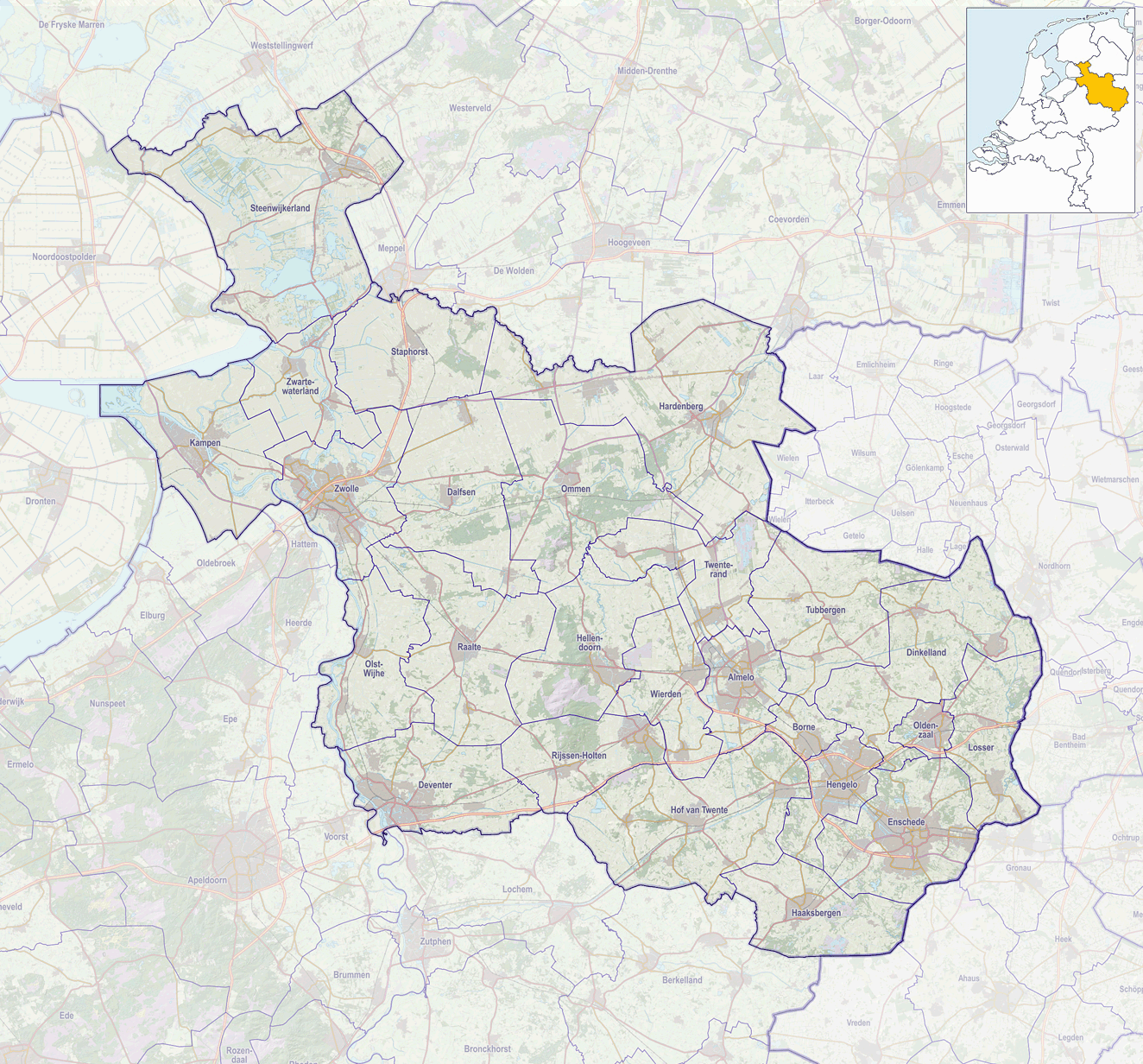 Positiekaartje van de provincie, variant "gemeentelabels"